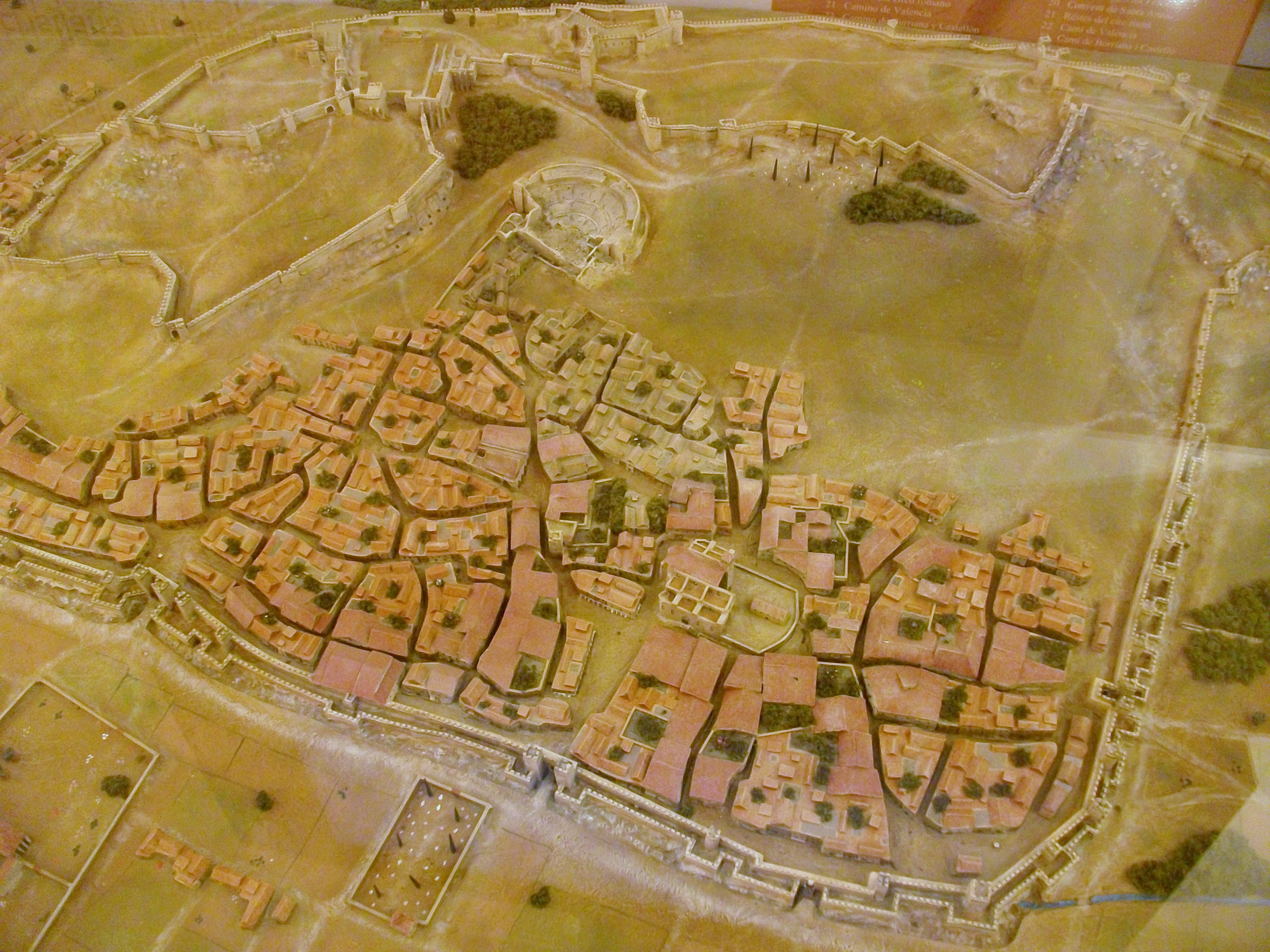 Maqueta del Sagunt medieval, Casa dels Berenguer (centre d'informació i interpretació de la ciutat).